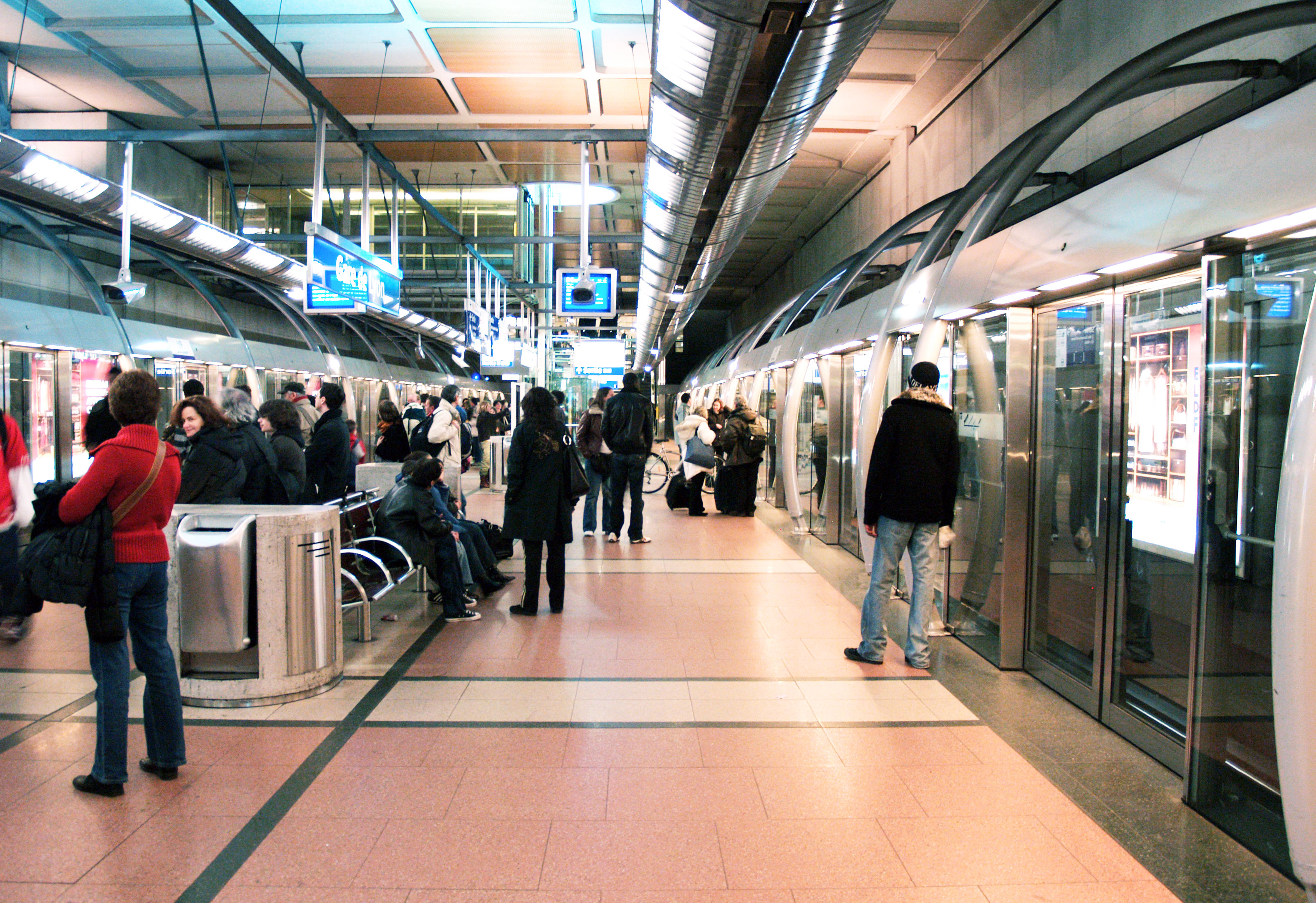 Métro - Ligne M14